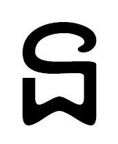 но кхмер